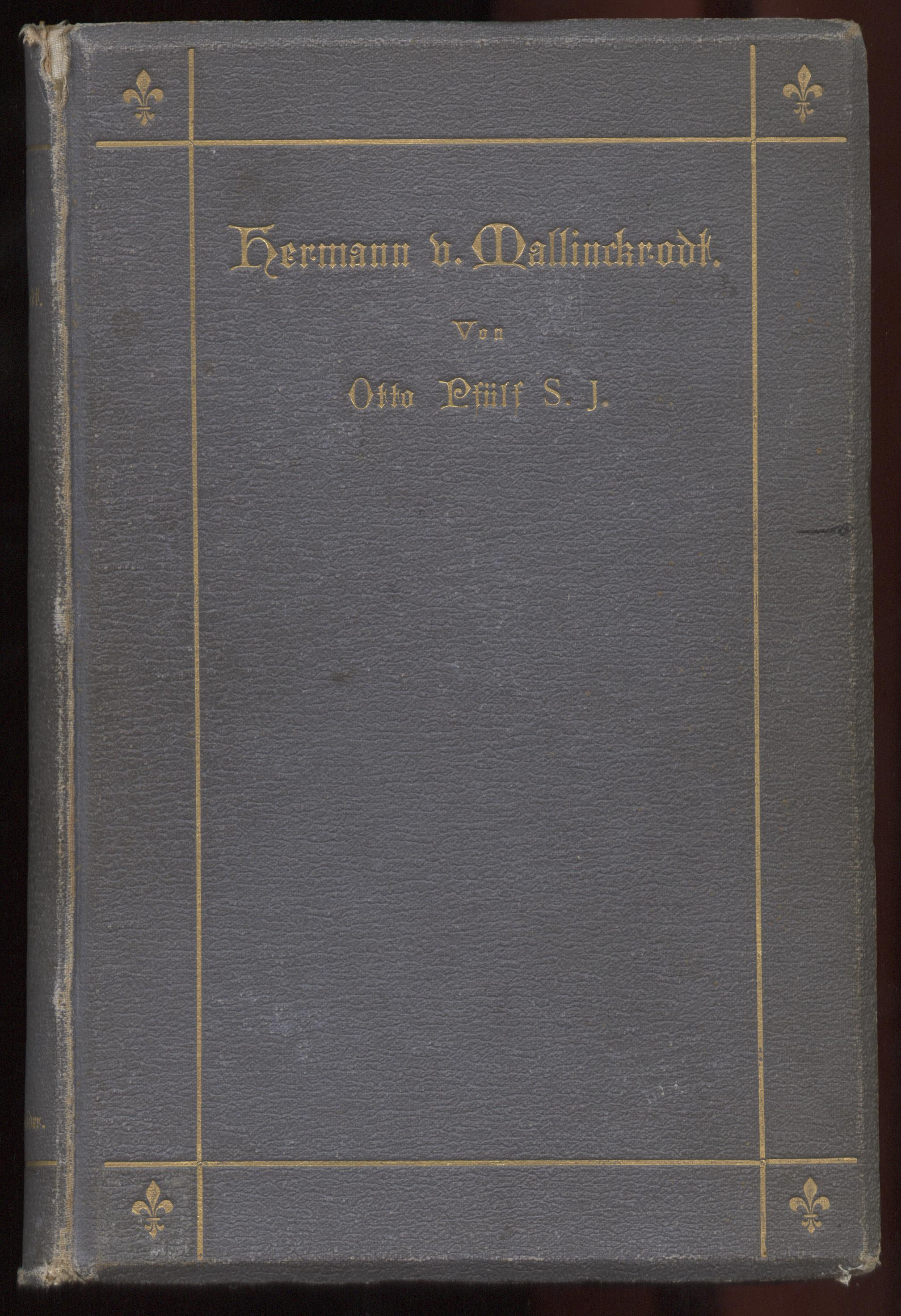 Otto Pfülf S.J., eines seiner Bücher